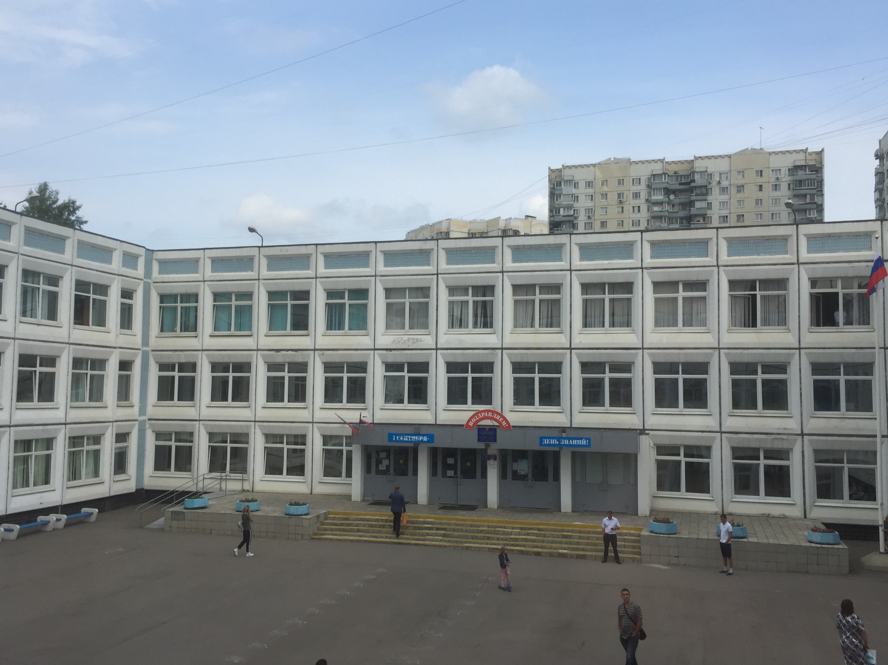 Москва, Россия, September 2018 - Бывшая школа 148, ныне "подразделение школы 1288" на Хорошевском шоссе, 64a